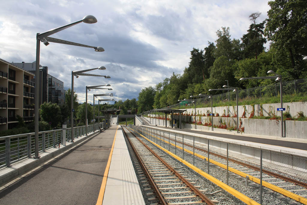 Åsjordet t-banestasjon sett i retning mot Bjørnsletta.